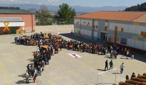 Mostra de solidaritat de l'institut Jaume Callís de Vic (Osona, Catalunya, Països Catalans) amb les Illes Balears, per una educació en català, el dia 2 de maig de 2012. Va ser una iniciativa de l'assemblea d'Osona de Maulets i dels i les estudiants de l'institut.